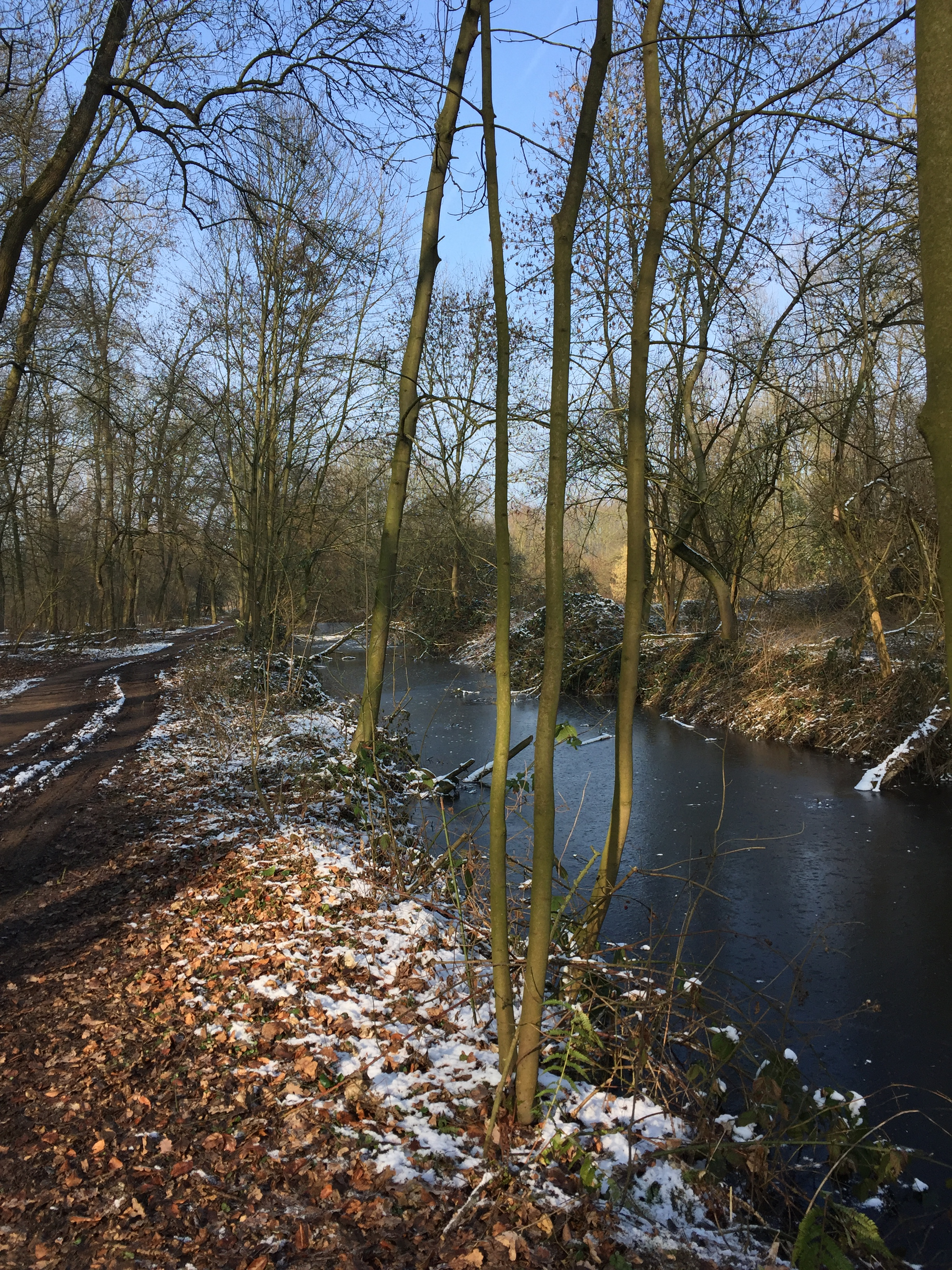 Verschneite Aufnahme des Naturschutzgebietes „Große Laache“.